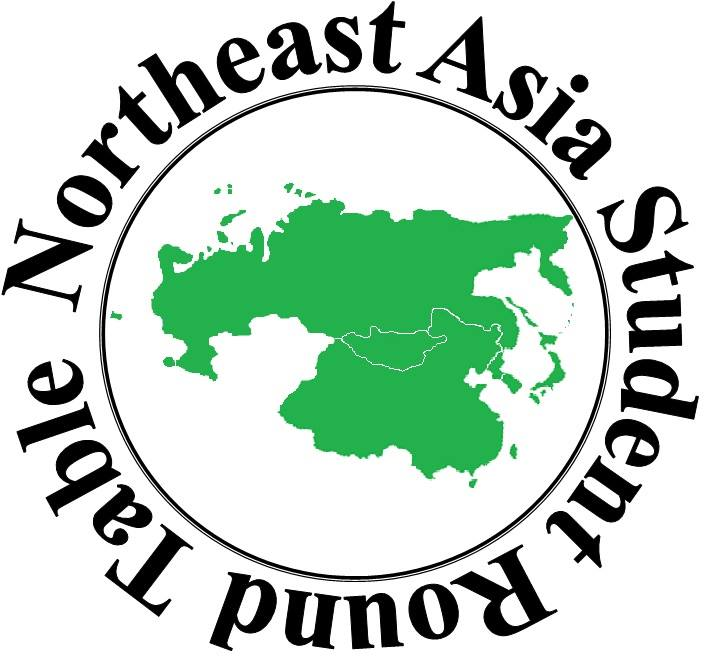 SRTのロゴ